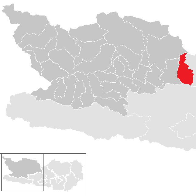 Bezirk Spittal an der Drau